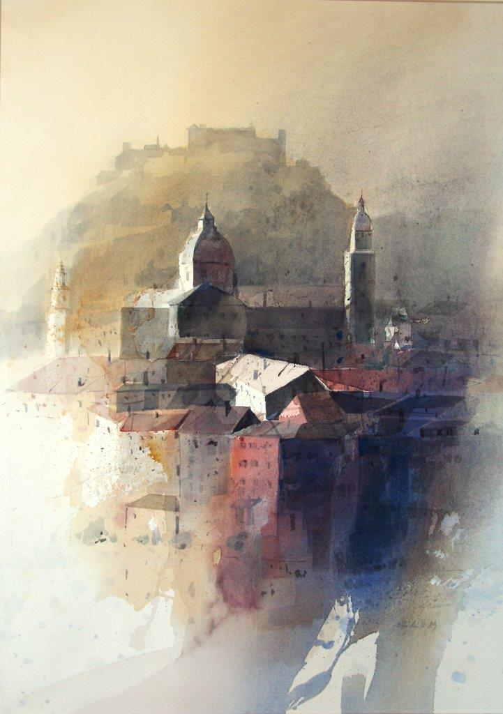 Willy Reichert, Stilrichtung Landschaften